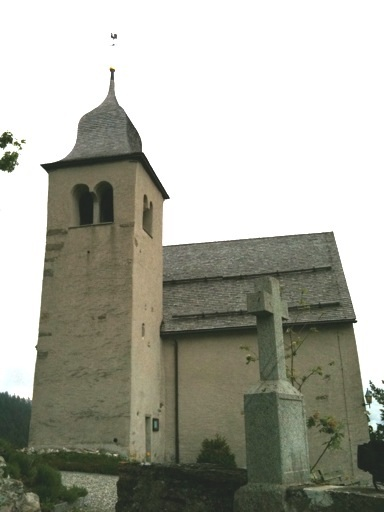 reformierte Kirche Feldis, Kanton Graubünden